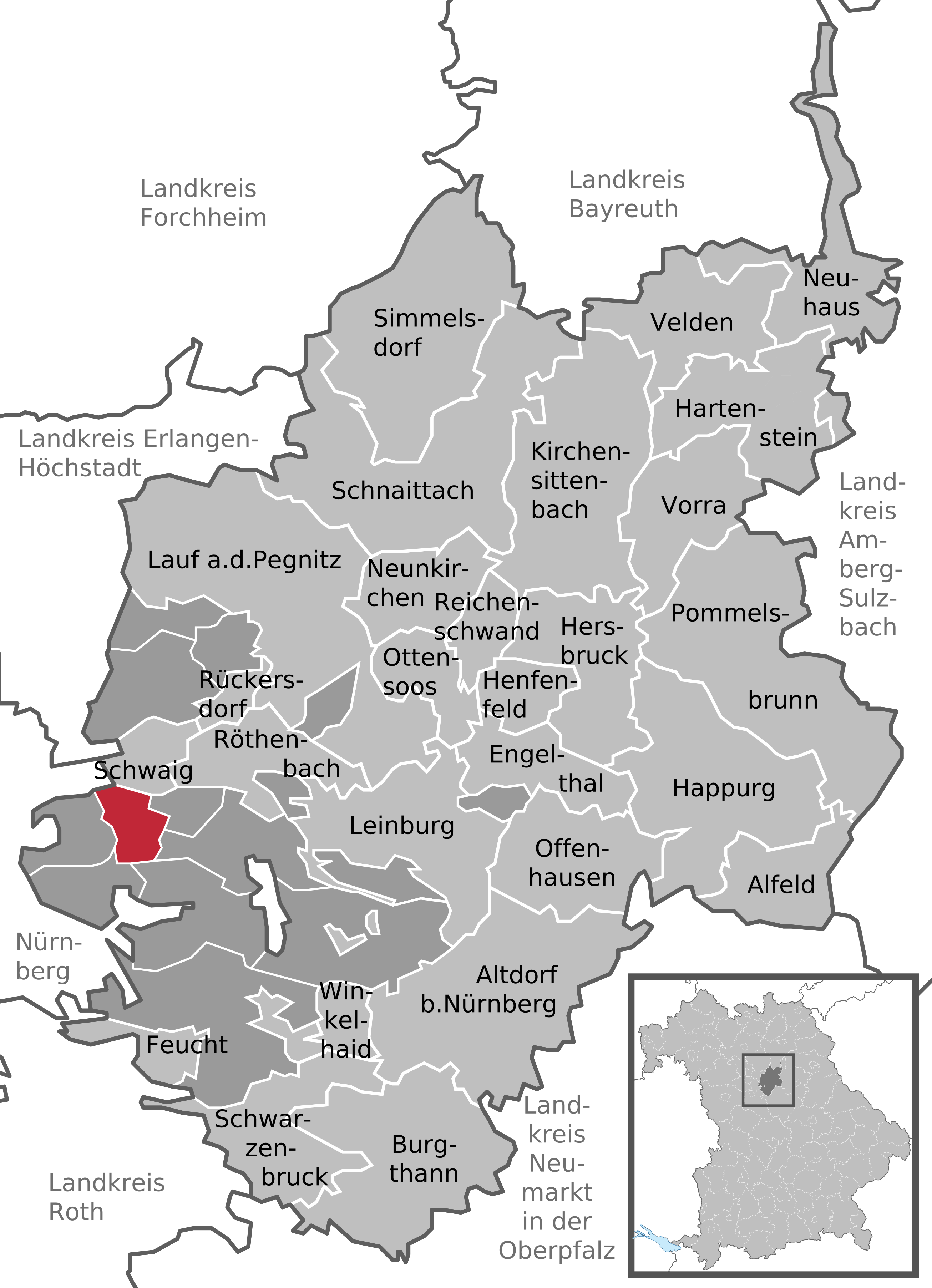 Positionskarte des gemeindefreien Gebietes Laufamholzer Forst